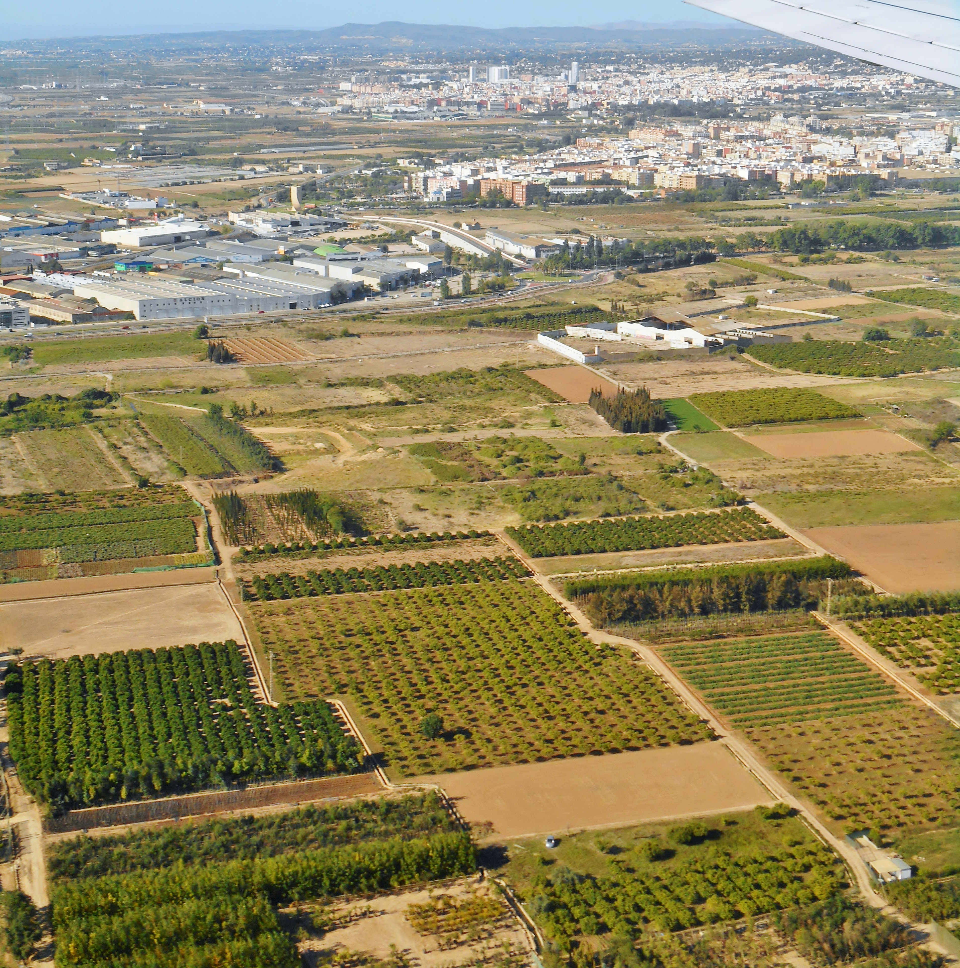 Vista aèria presa des d'un avió.